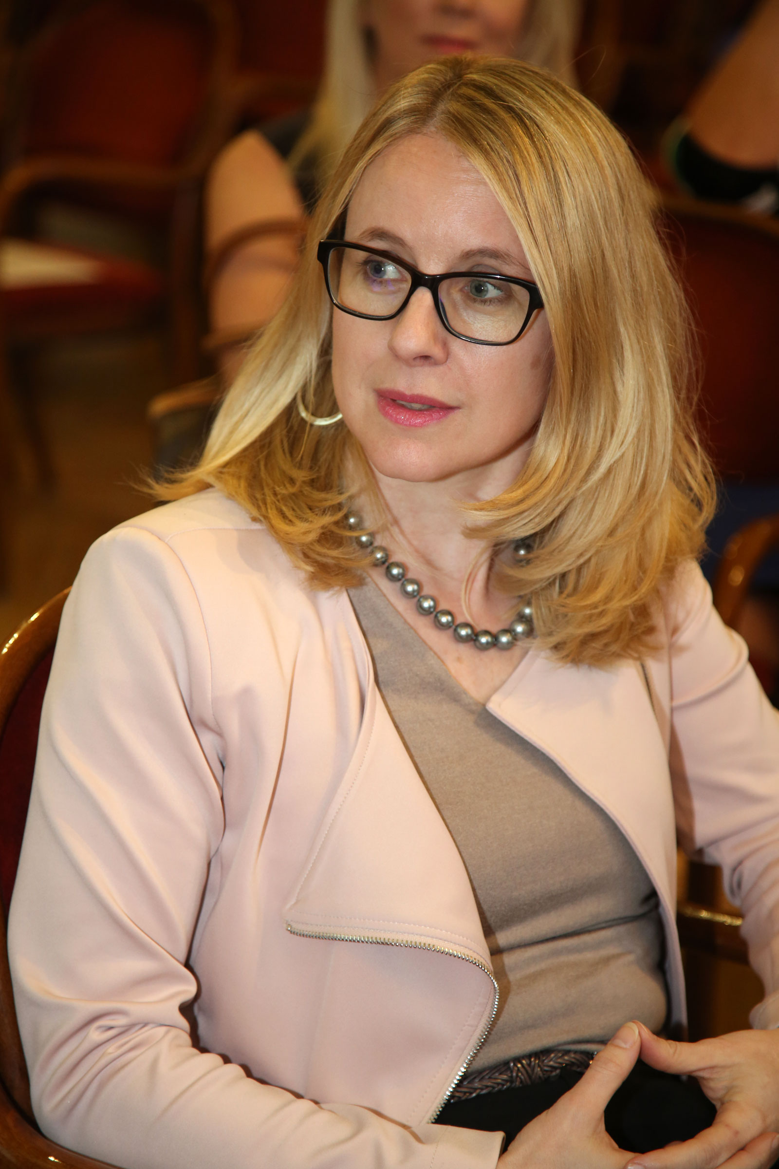 Dr. Margarete Schramböck, General Manager Dimension